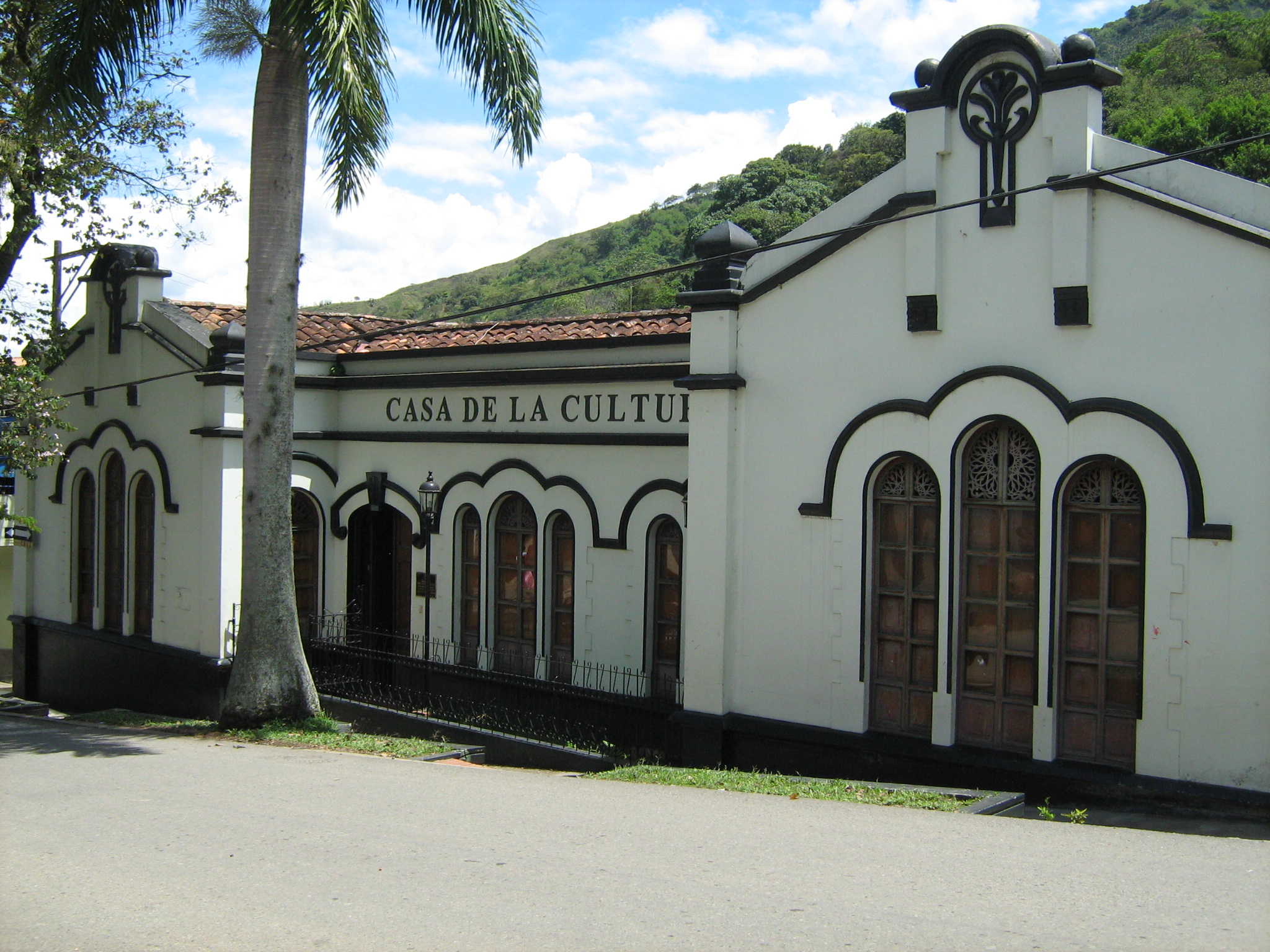 Casa de la Cultura del Municipio de Ciudad Bolívar, Antioquia, Colombia